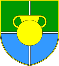 Wappen von Šmarješke Toplice Slowenien